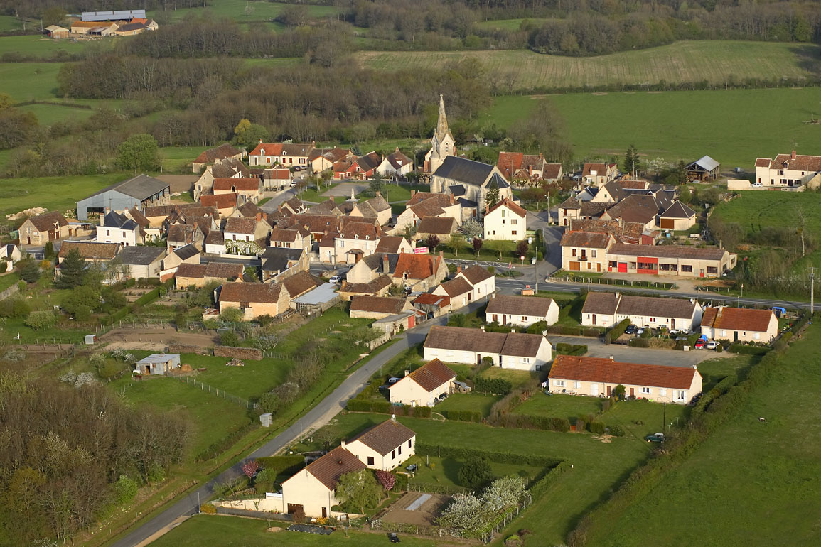 Vue oblique du village de Lureuil, dans l'Indre.